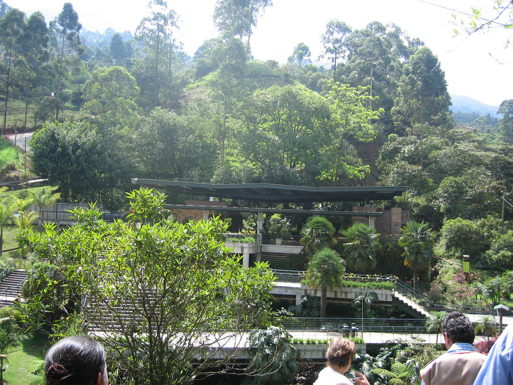 Ecoparque Los Salados de Envigado. Colombia.